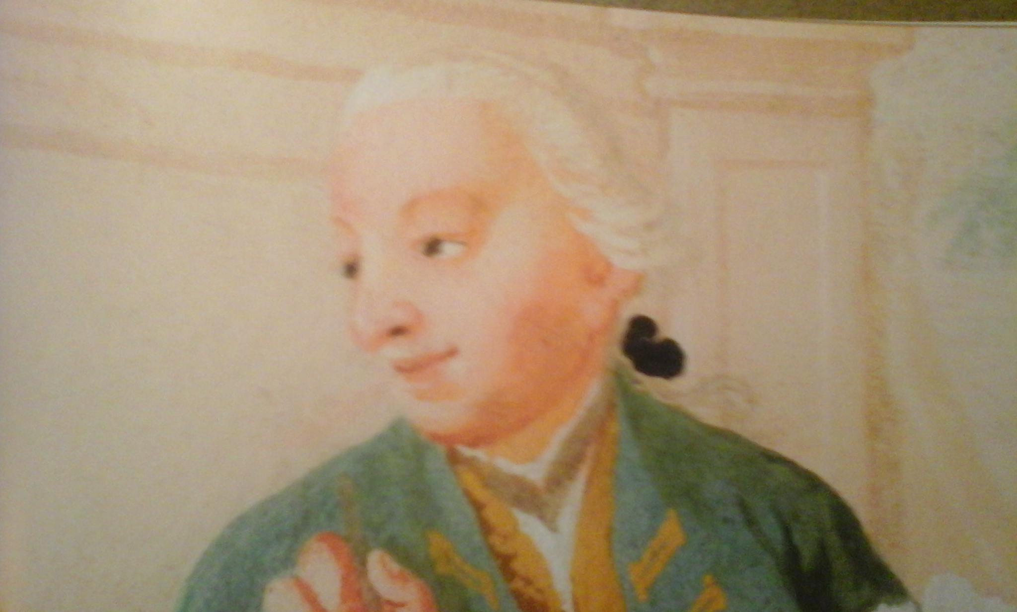 portrét Josefa Fortina z Prokyšovy Alegorie stavitelství v letohrádku Bellaria v Českém Krumlově